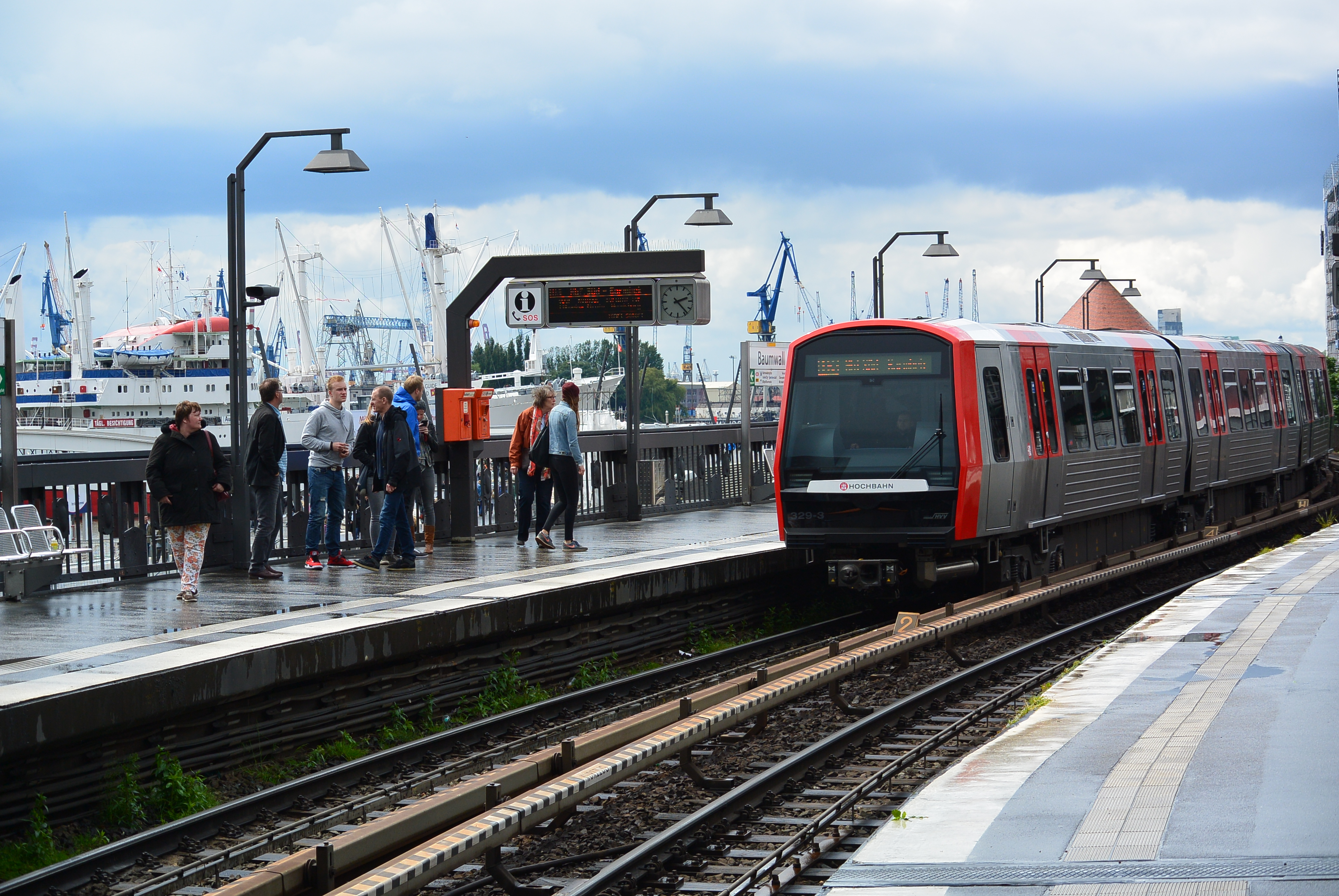 U-Bahnhof Baumwall